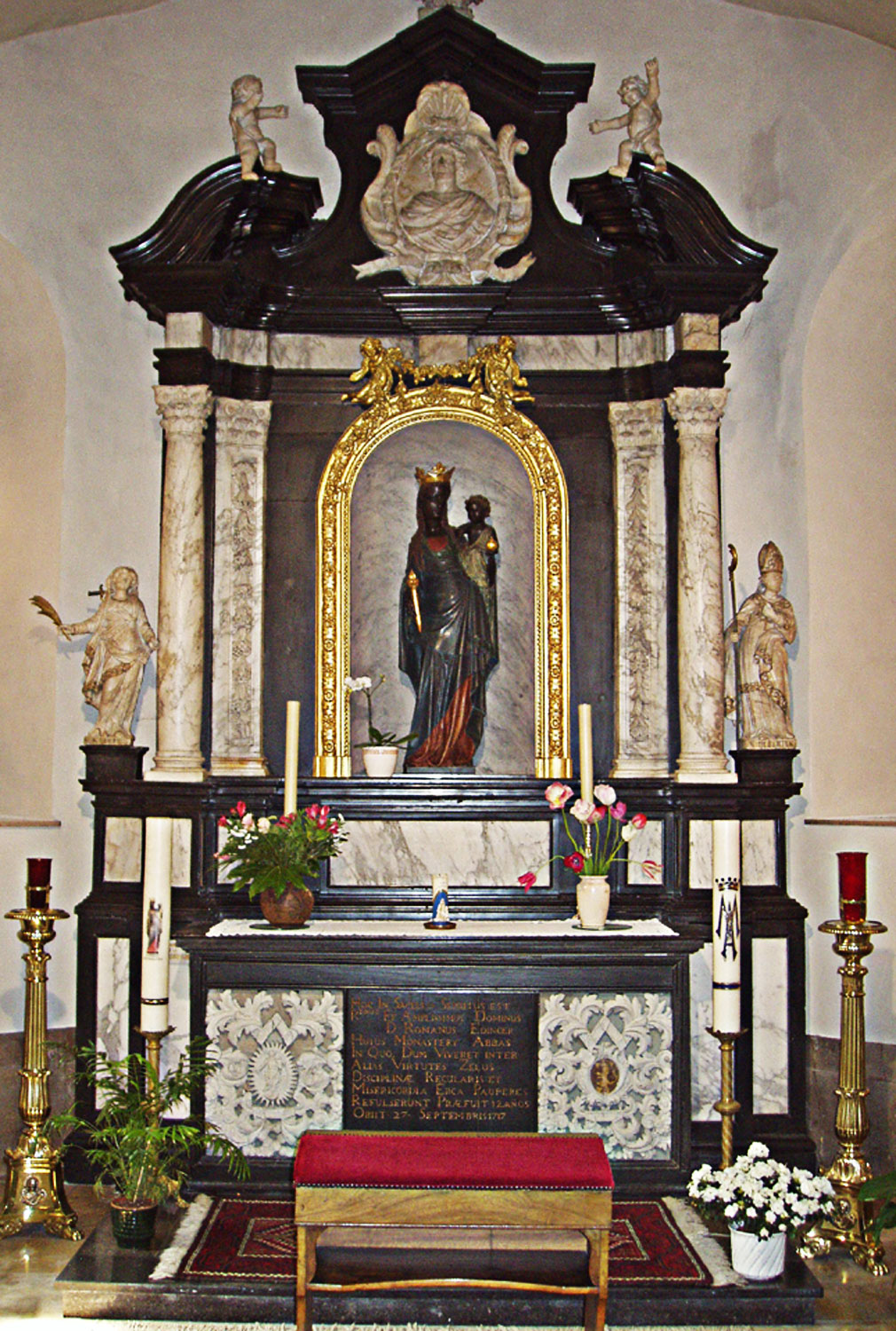 Di Schwaarz Noutmuttergottes op hierem Barockaltor. Si steet an der Kierch vum Stadgronn.